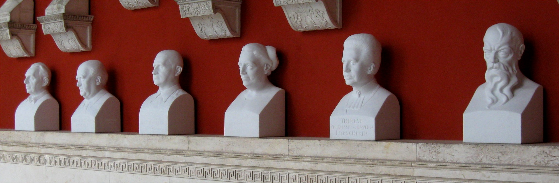 Ruhmeshalle München:Sechs im Jahre 2009 neu aufgestellte Büsten: von links nach rechts Carl Orff, Werner Heisenberg, Bertolt Brecht, Emmy Noether, Therese Prinzessin von Bayern und Franz von Lenbach